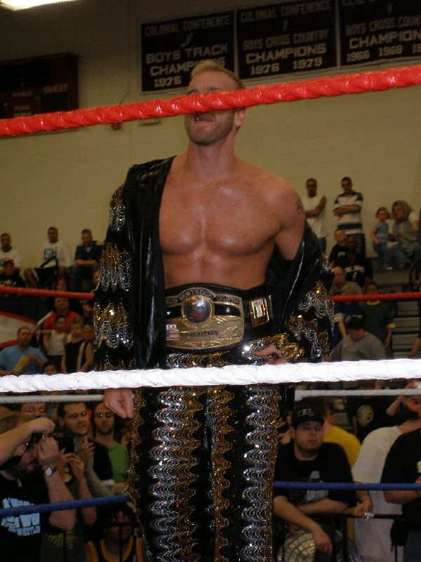 Christian Cage come NWA Champion.